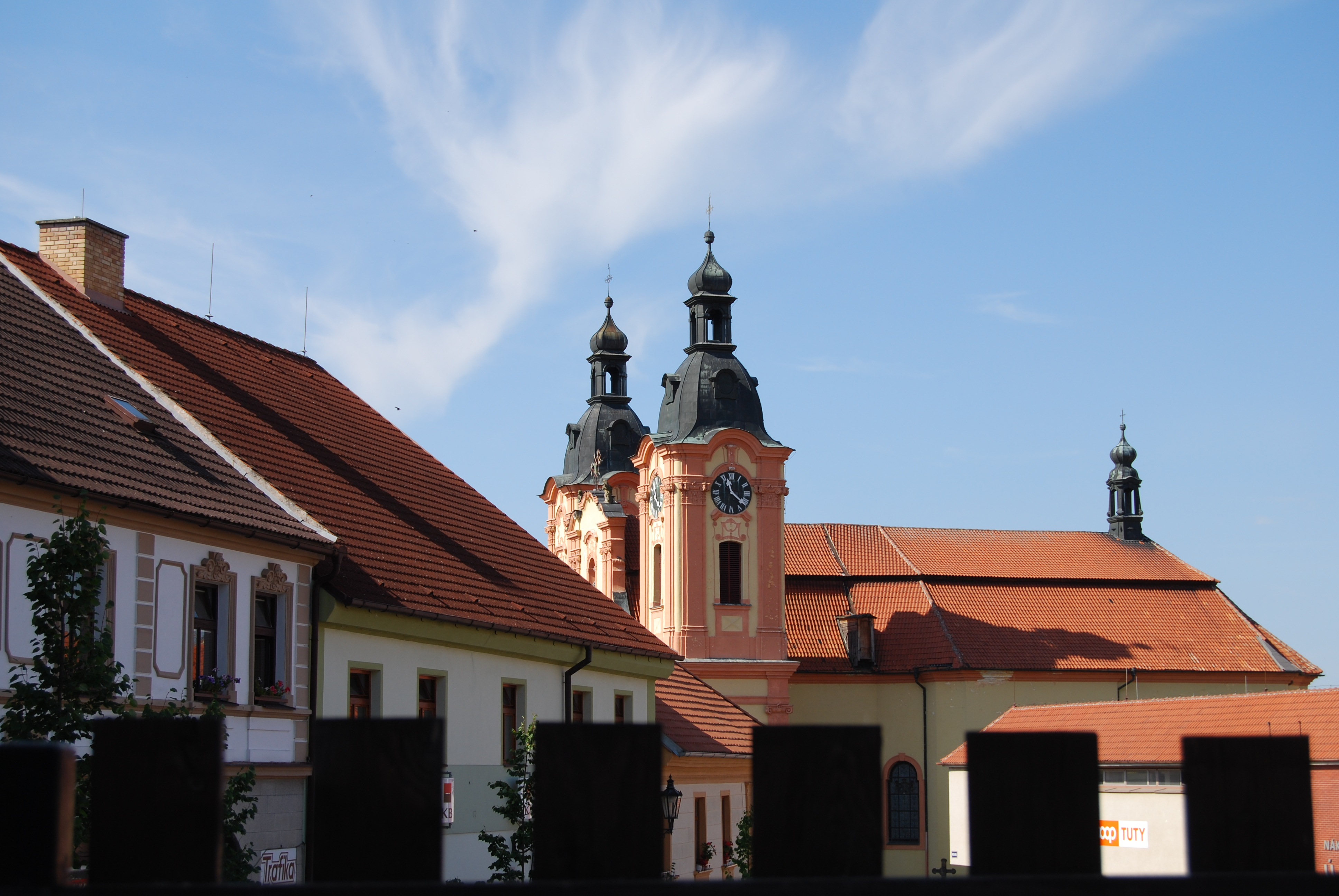 Kostel sv.Jana Nepomuckého. Nepomuk. Okres Plzeň Jih. Česko.